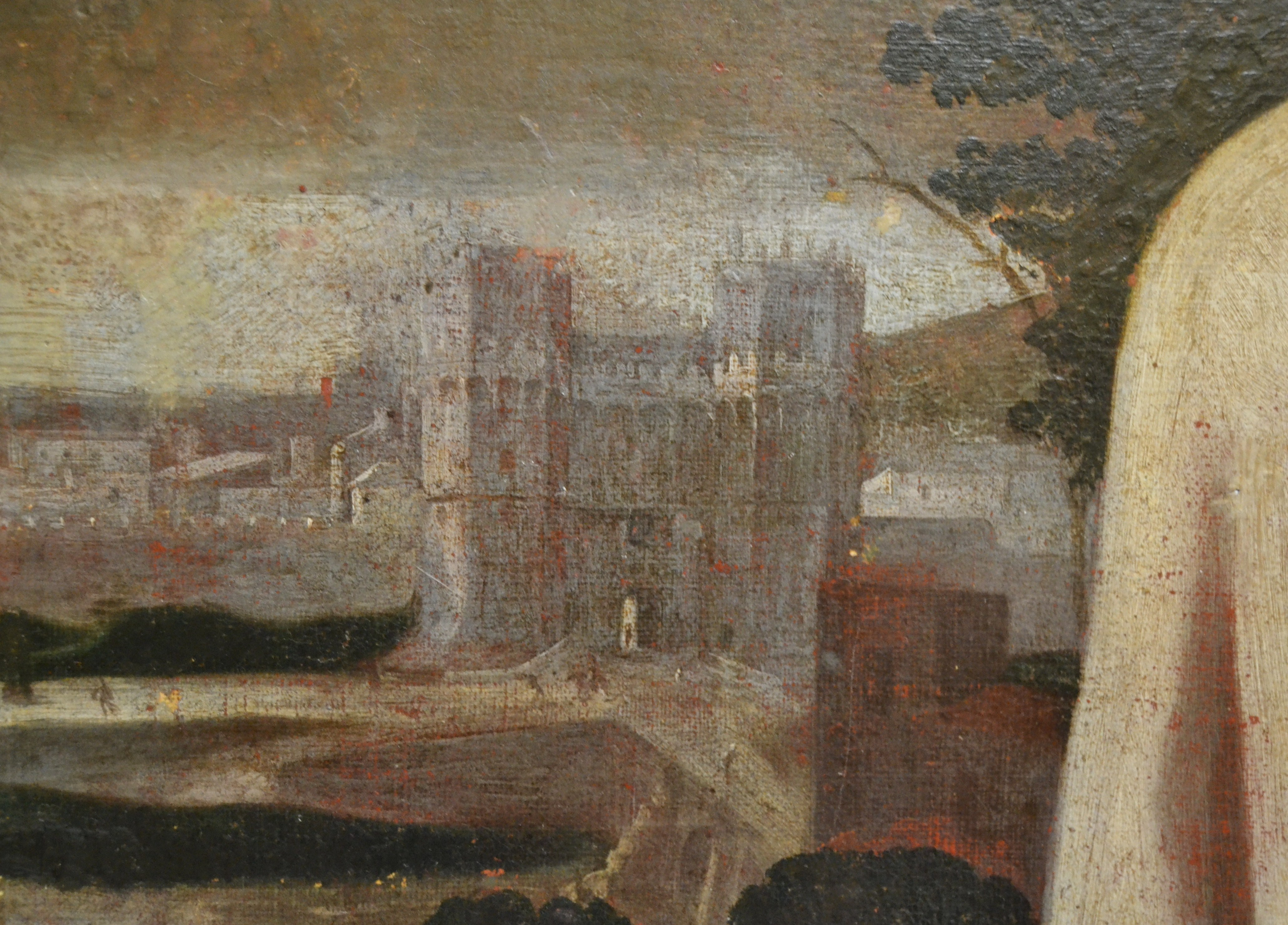 Torres de Serrans en un quadre (Sant Vicent Ferrer) de Jeroni Jacint Espinosa, Museu de Belles Arts de València.